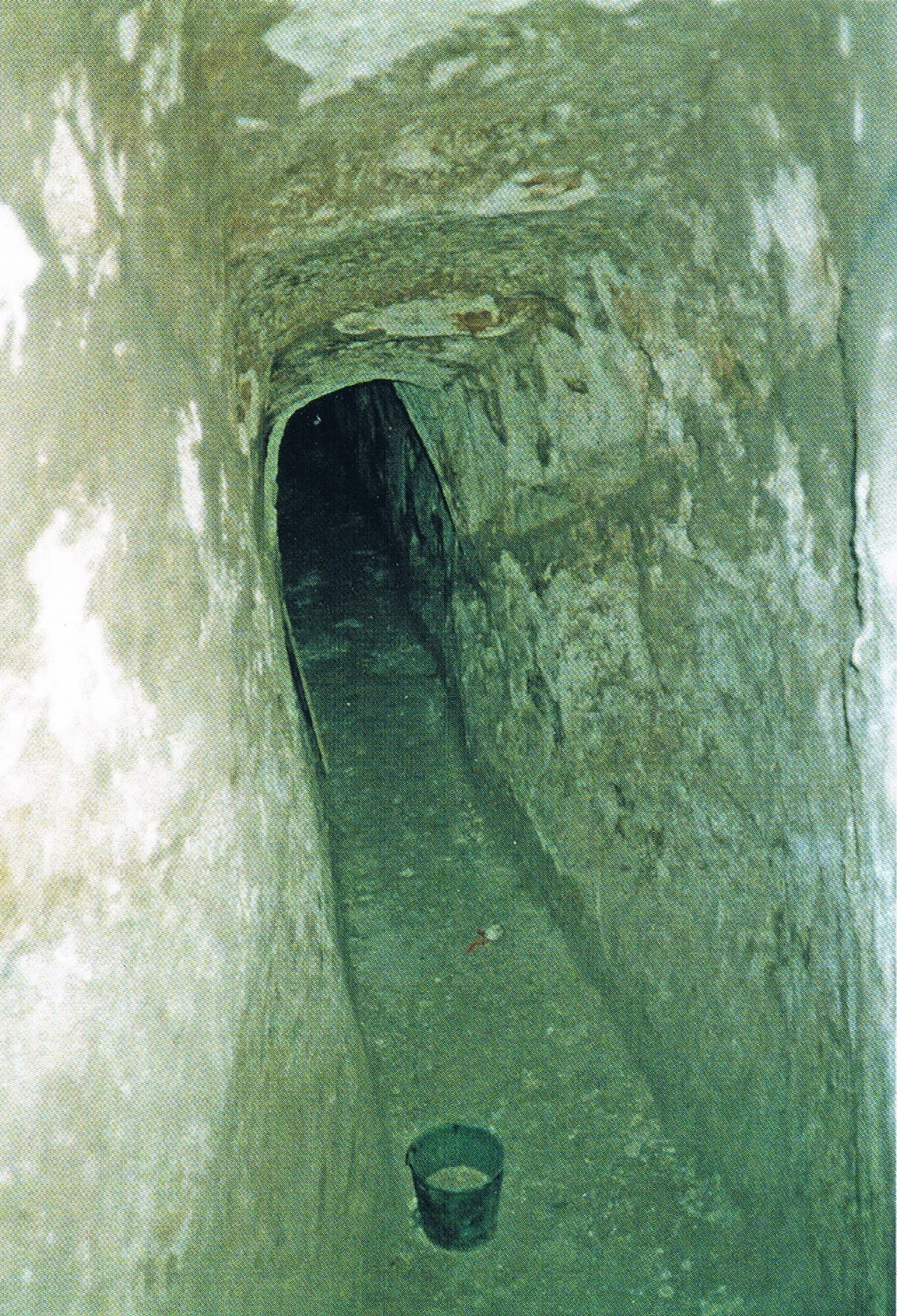 פתח הכניסה למערכת המים התת קרקעית במצד שער העמקים